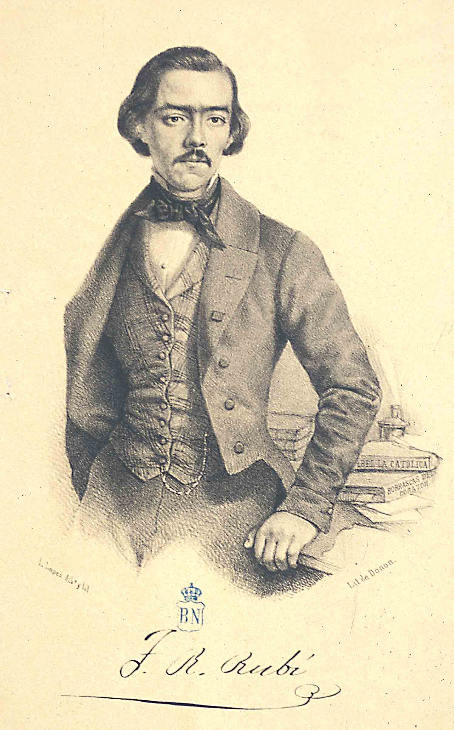 Retrato de Tomás Rodríguez Rubí